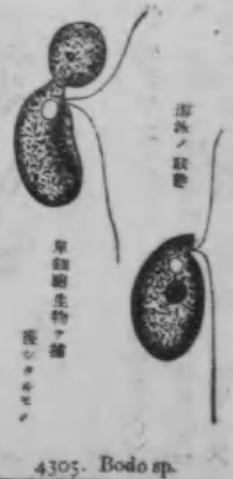 ボド（ボド科）の一種